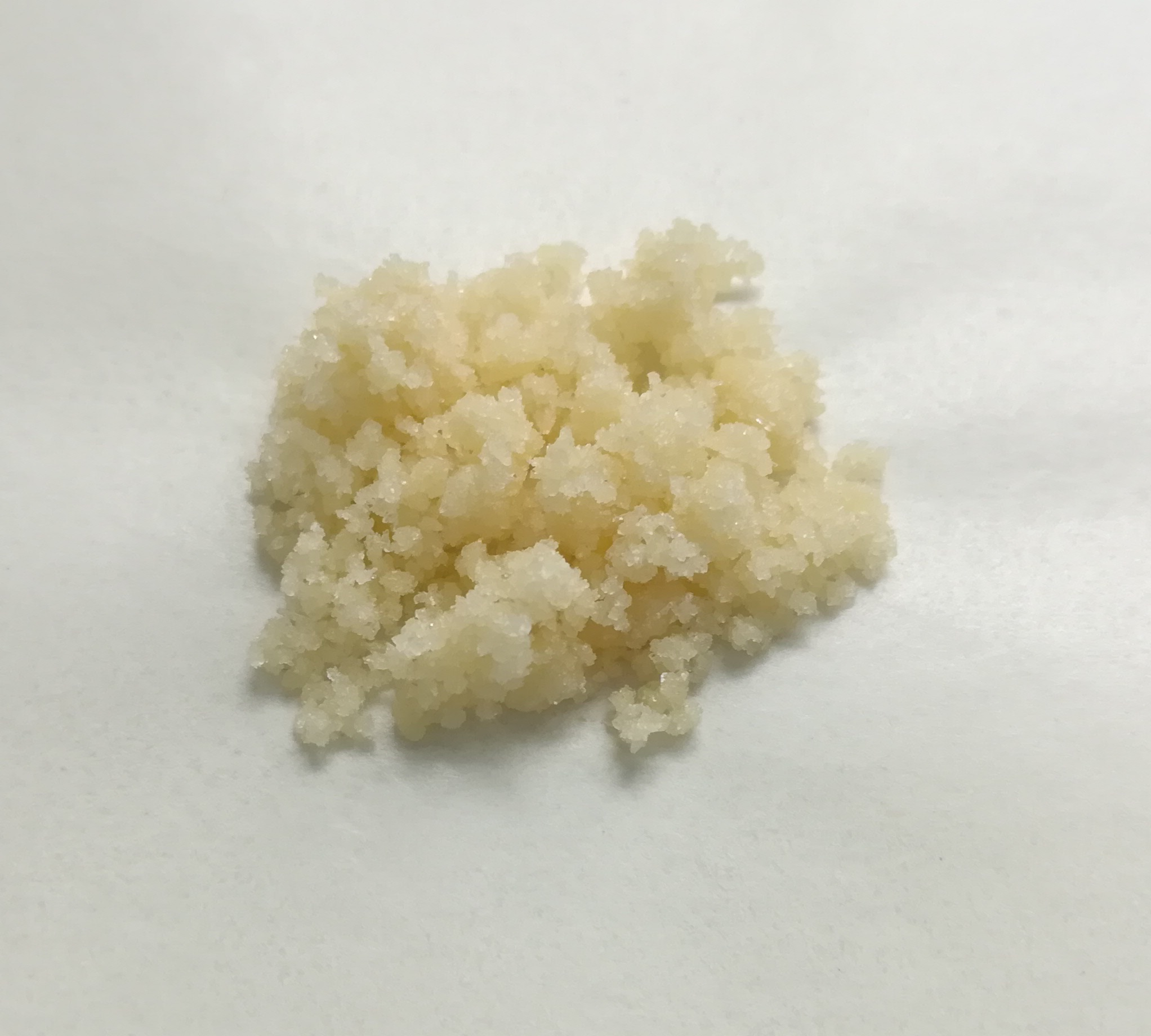 中文（中国大陆）: 硒氰酸钾（化学式：KSeCN），纯度99% .